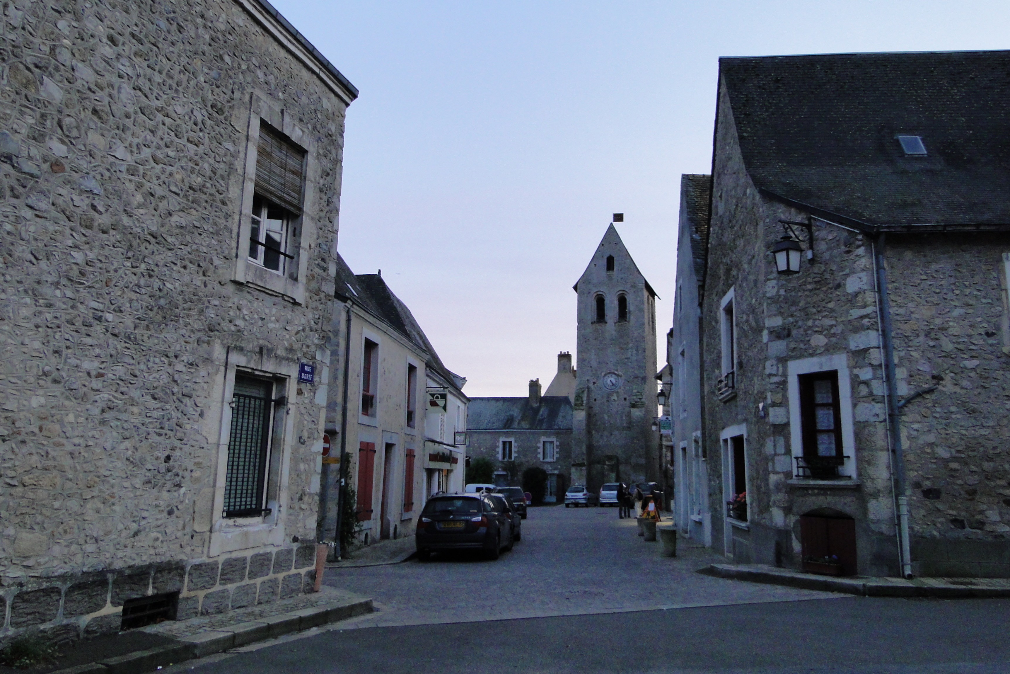 Bourg de Parcé-sur-Sarthe